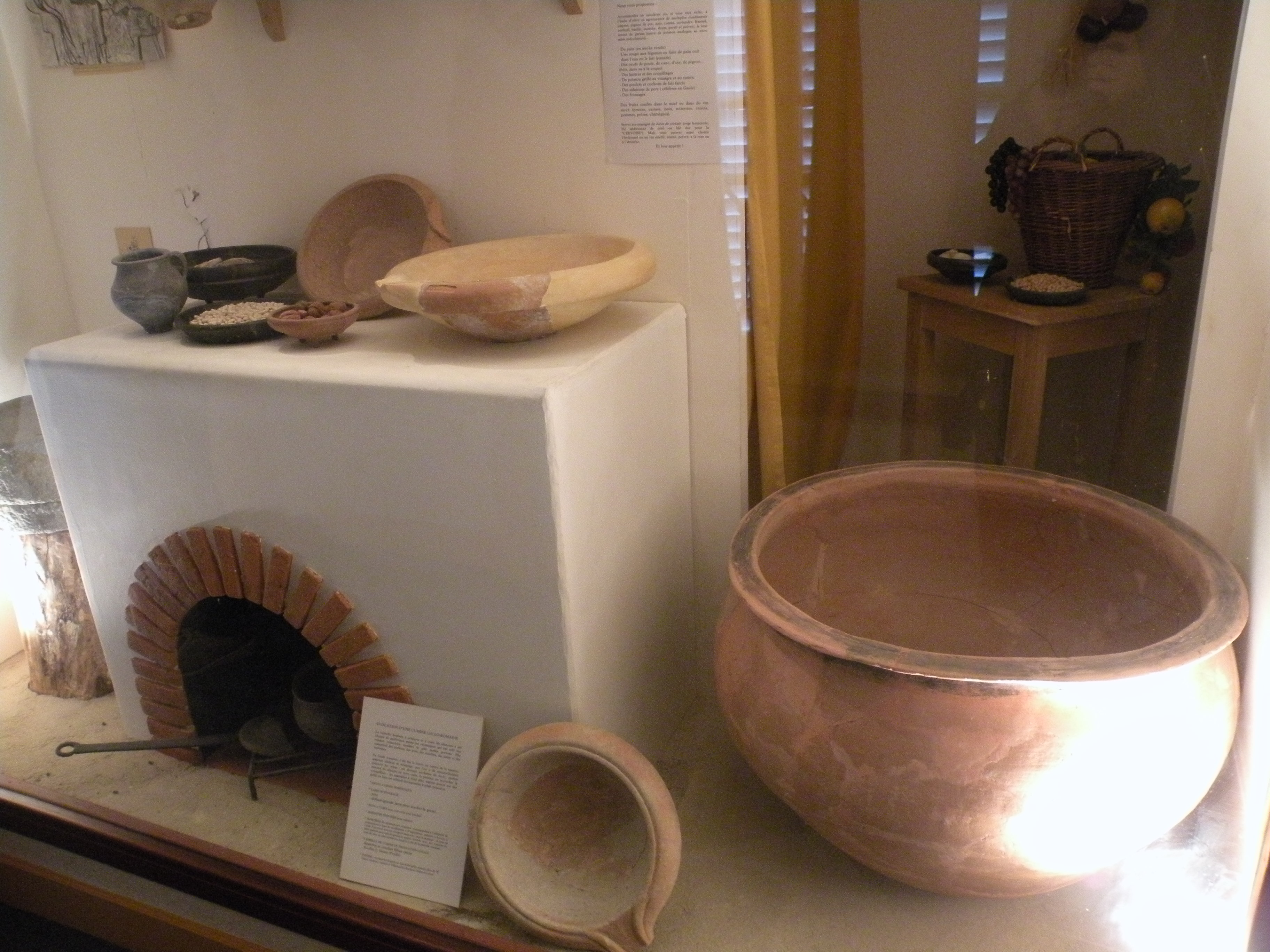 Musée de Thésée (Loir-et-Cher)